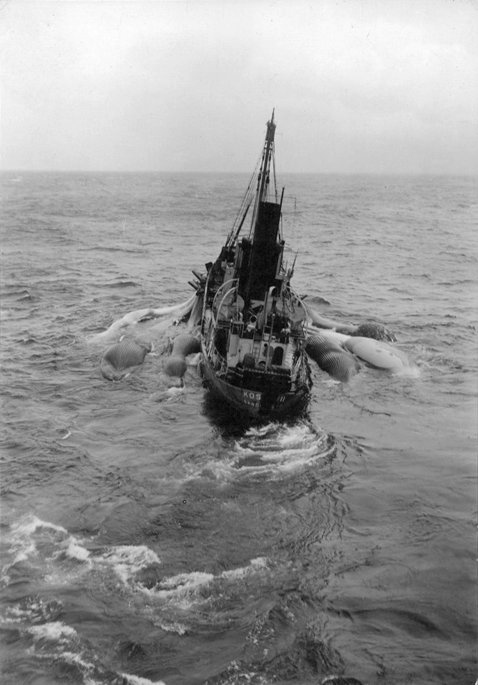 Film "Valfångare", 1939.11/37 83. Husmodern nr 47/39 sid 30.